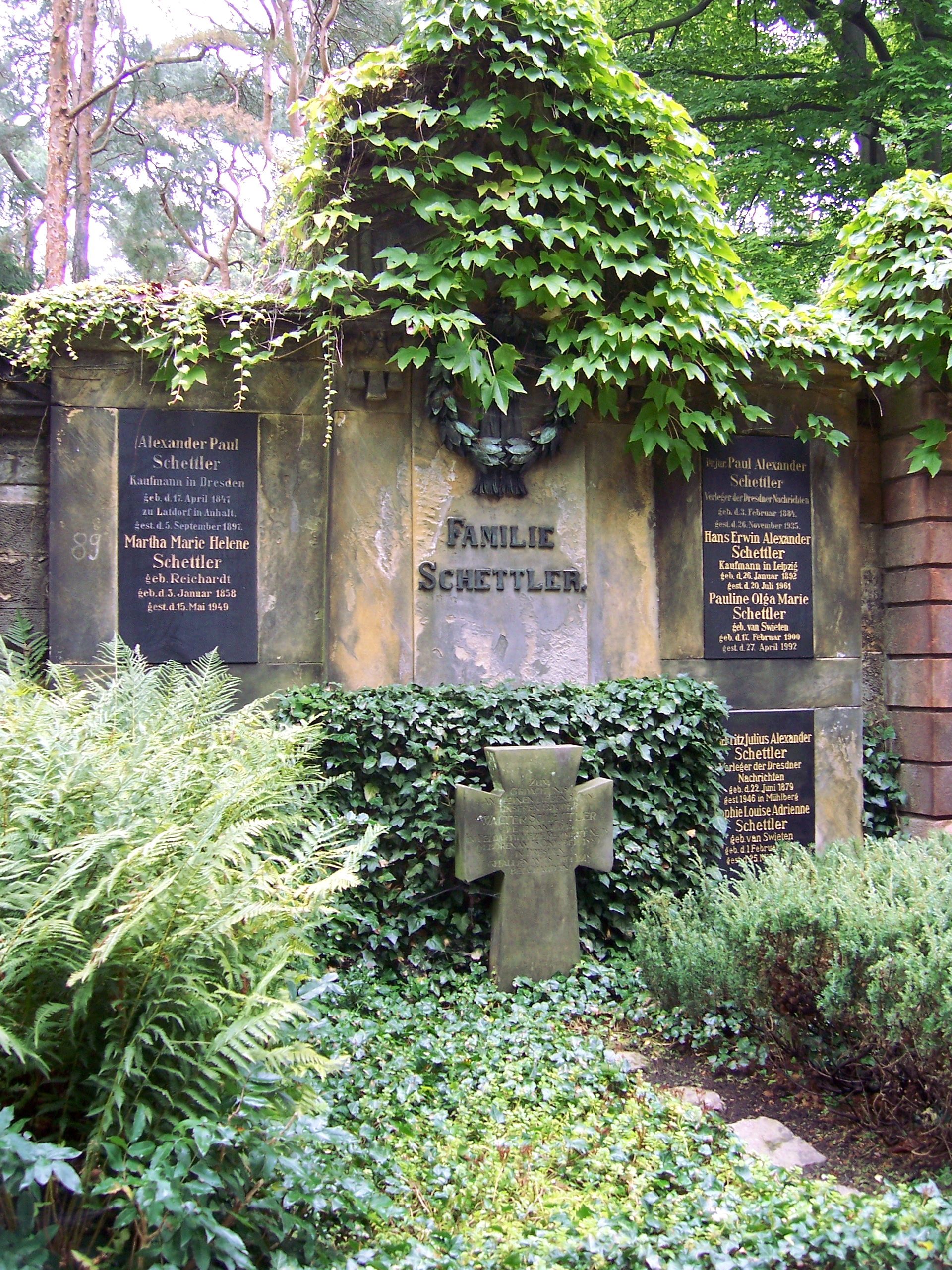 Familiengrabstätte Schettler (u.a. Verleger der Dresdner Nachrichten) auf dem Johannisfriedhof in Dresden